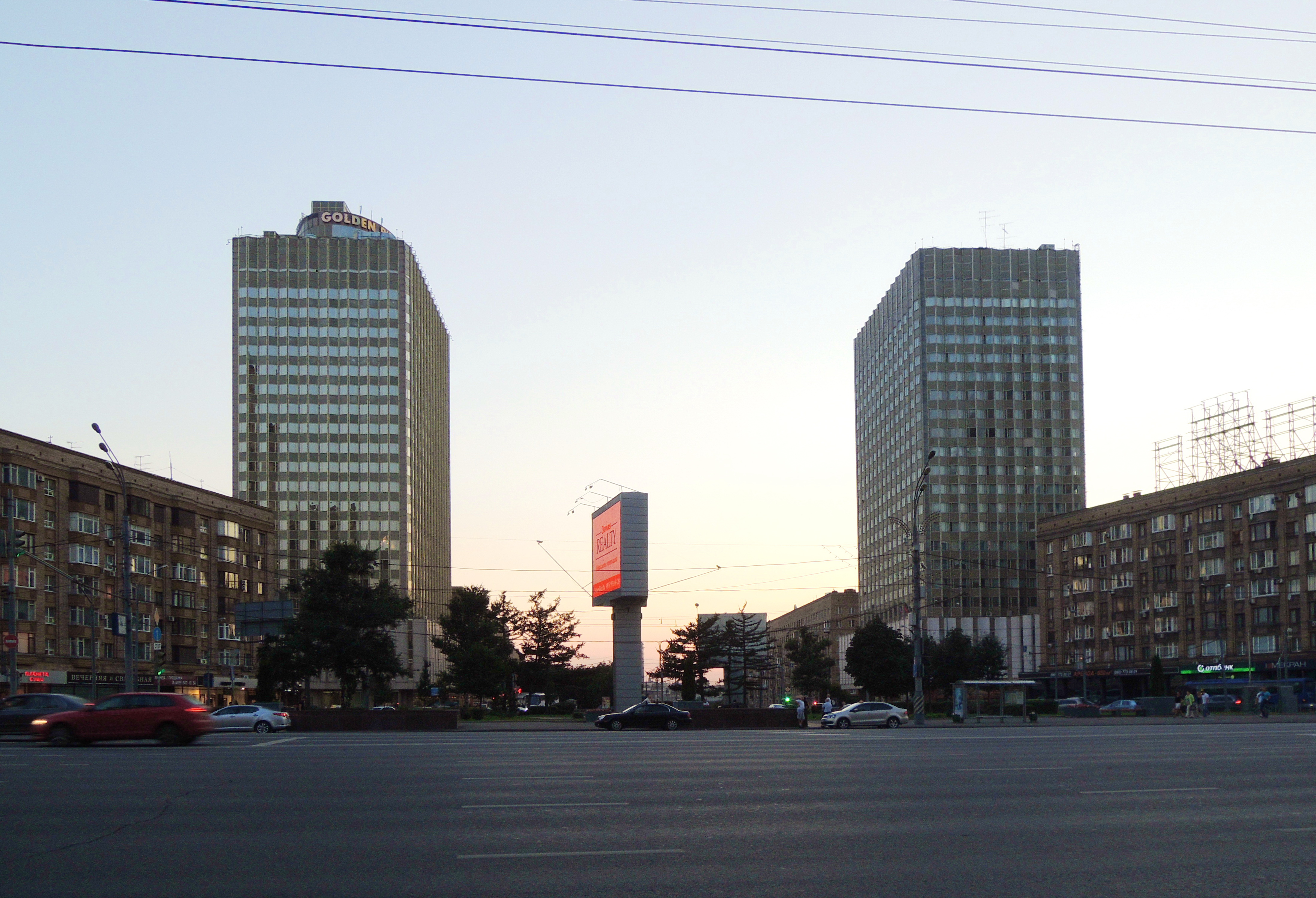 Смоленская-Сенная площадь